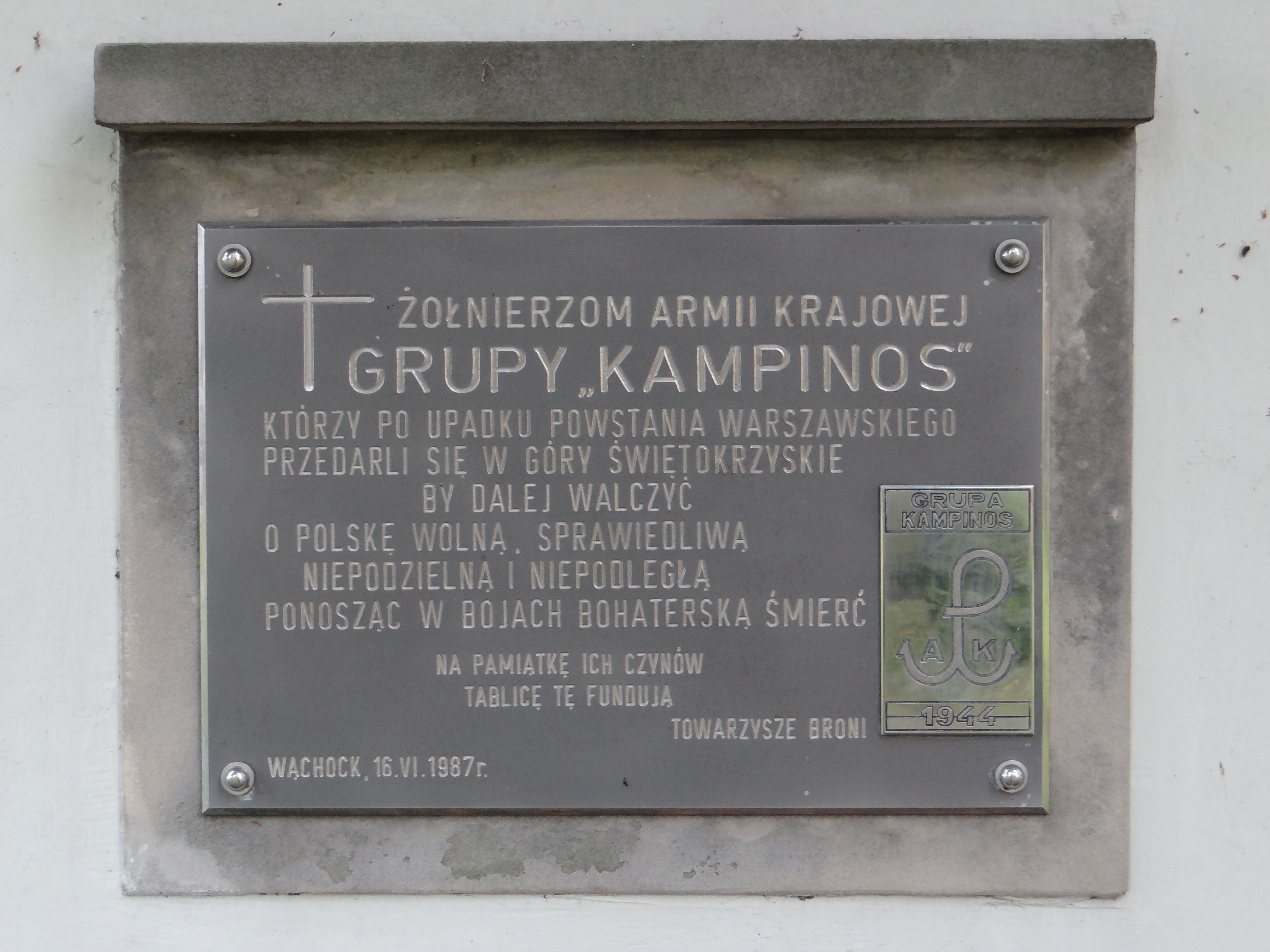 Klasztor Cystersów w Wąchocku - tablica upamiętniająca działania grupy AK "Kampinos" na terenie Gór Świętokrzyskich po upadku Powstania Warszawskiego